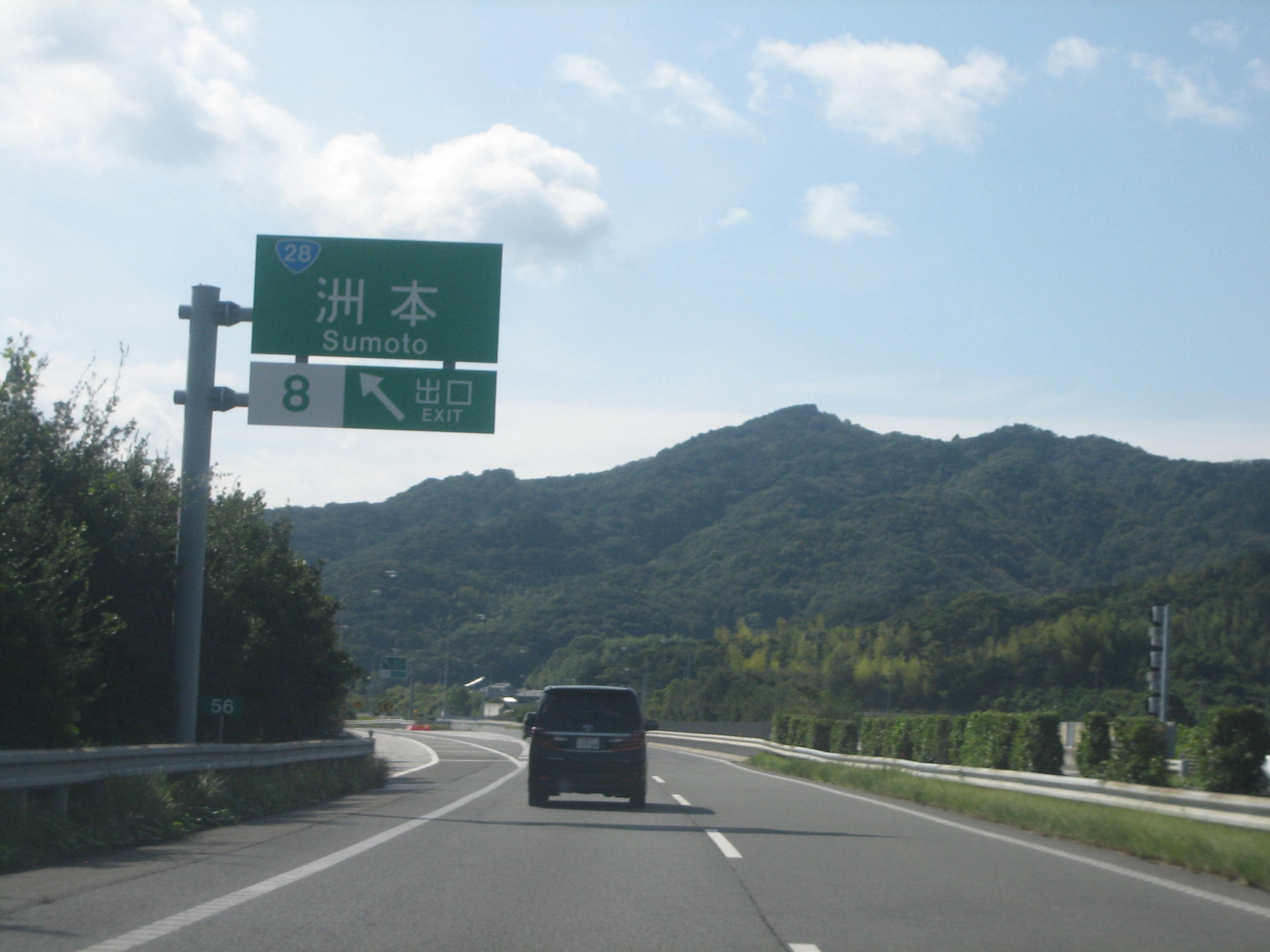 洲本IC